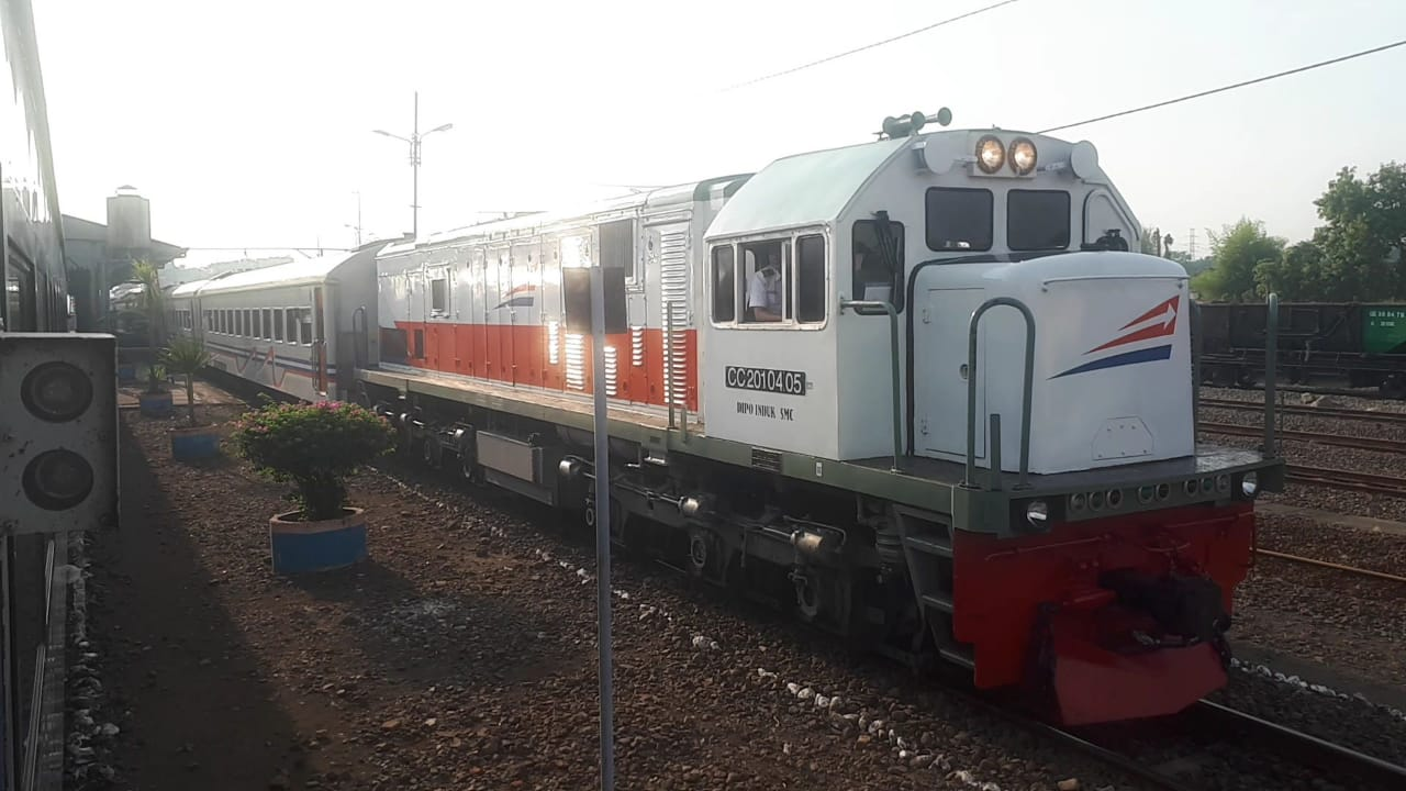 Kereta api Tumapel saat berhenti di Stasiun Bangil